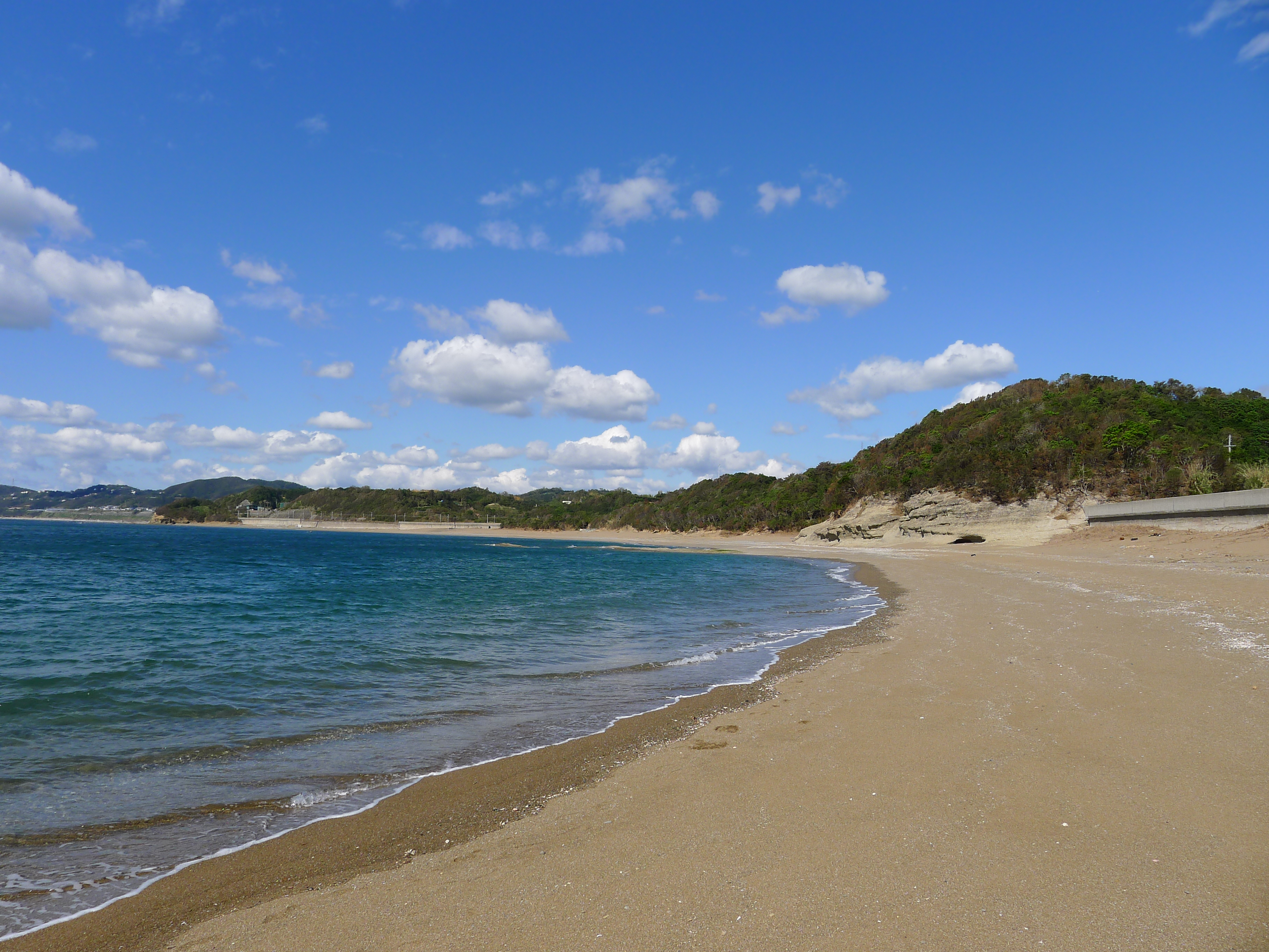 熊野古道紀伊路の名勝・千里の浜（和歌山県みなべ町）